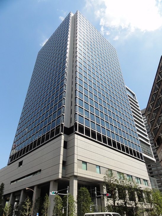 Iinobuilding